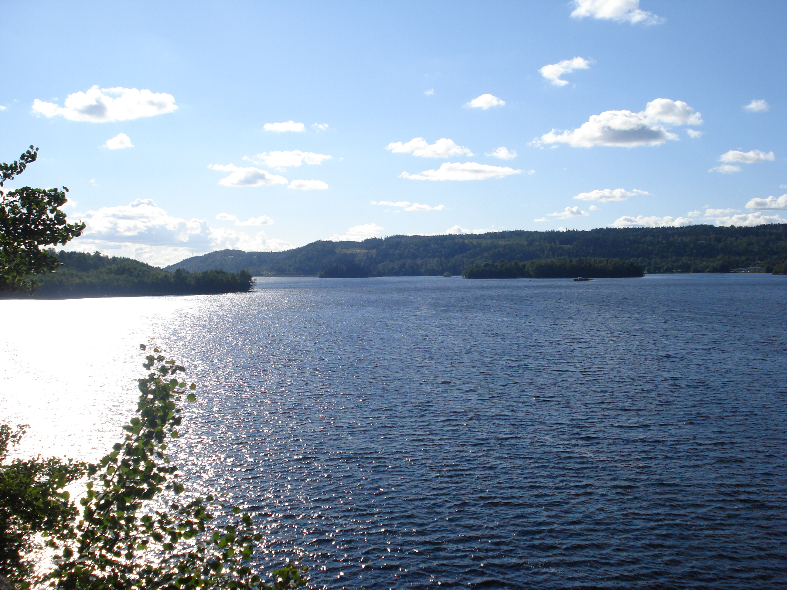 Viaredssjön